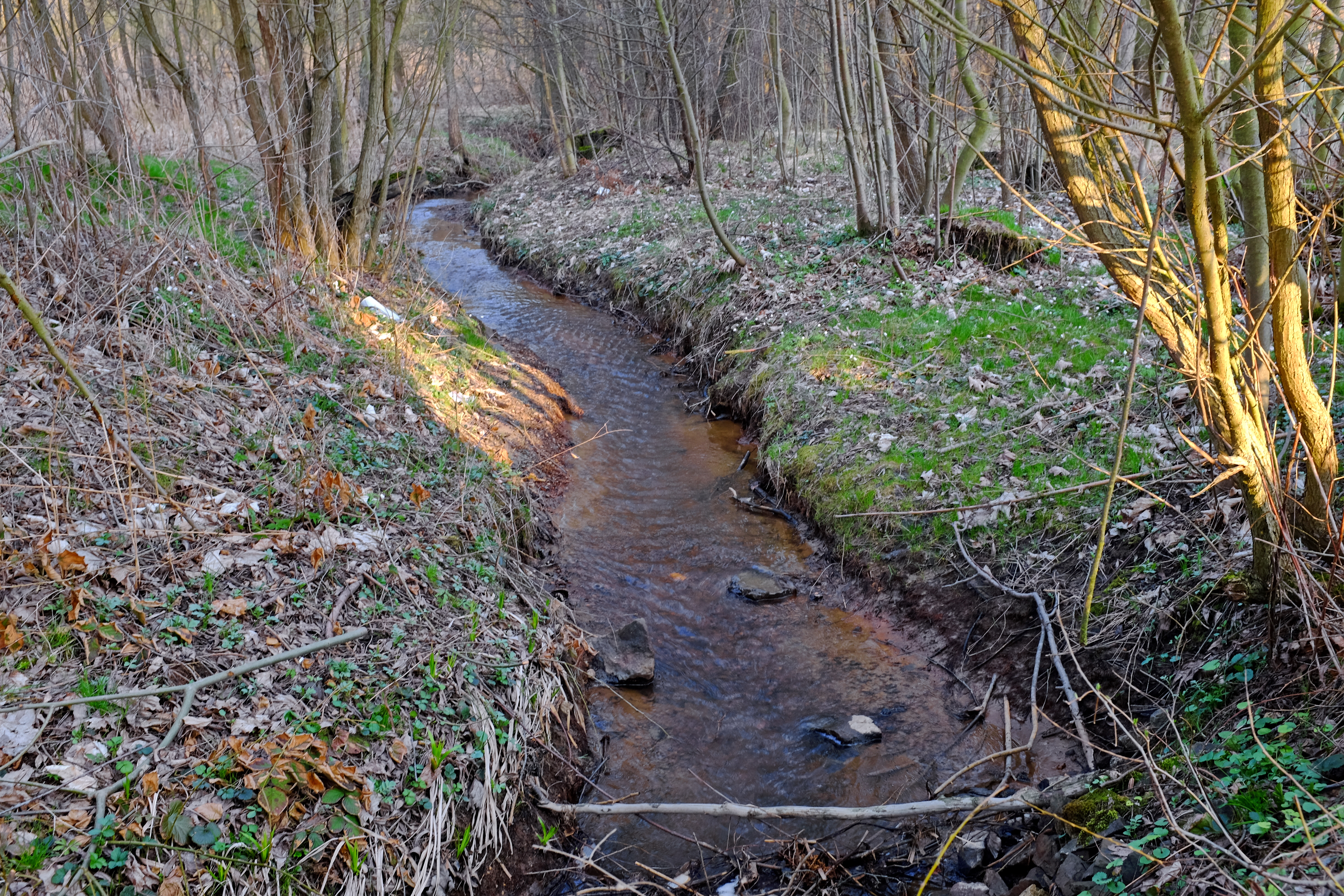 Suchý potok, přítok Ohře, v místě pod osadou Štědrá, okres Sokolov